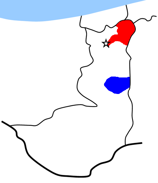 مازِرونی: سرخ ِسامون دابوئه و آبی جائون چلاوه.